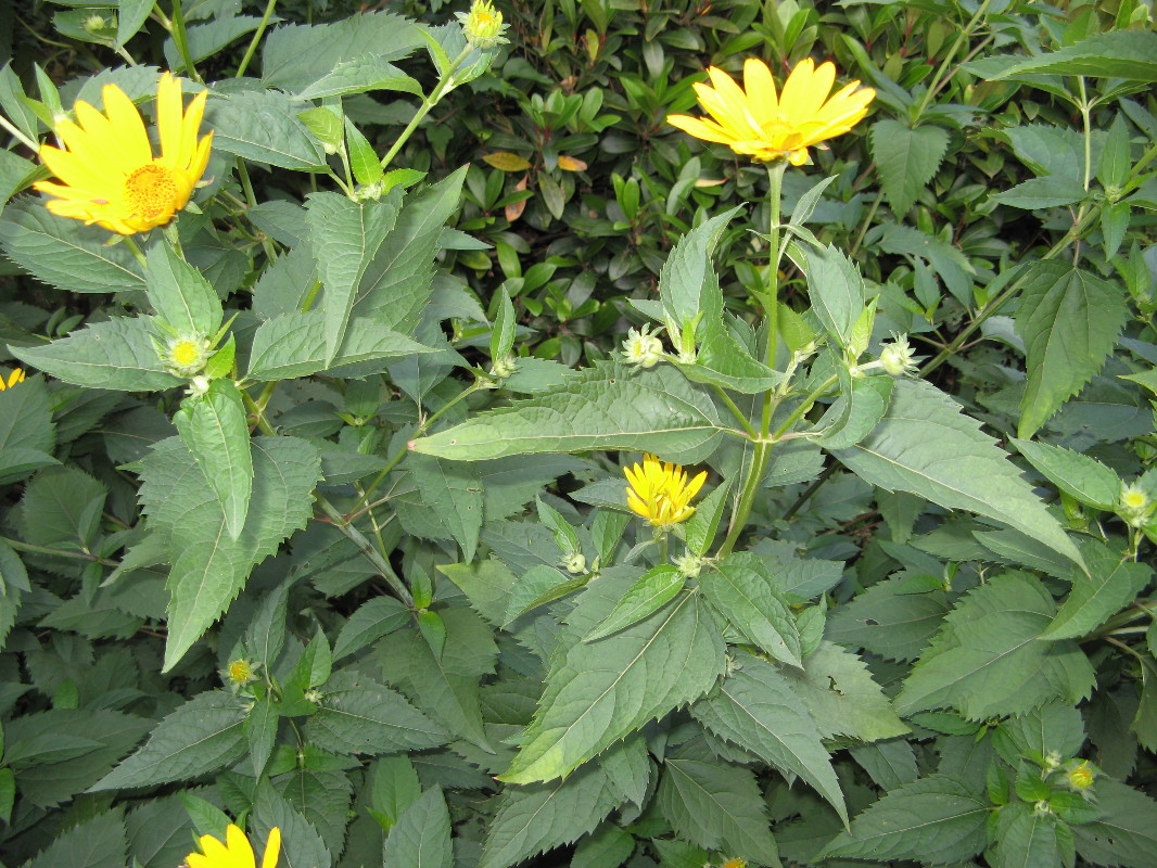 Ox-eye (heliopsis), growing in a garden in Belgium